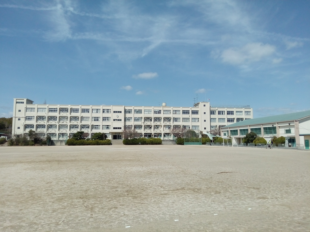 校舎、体育館、校庭全景